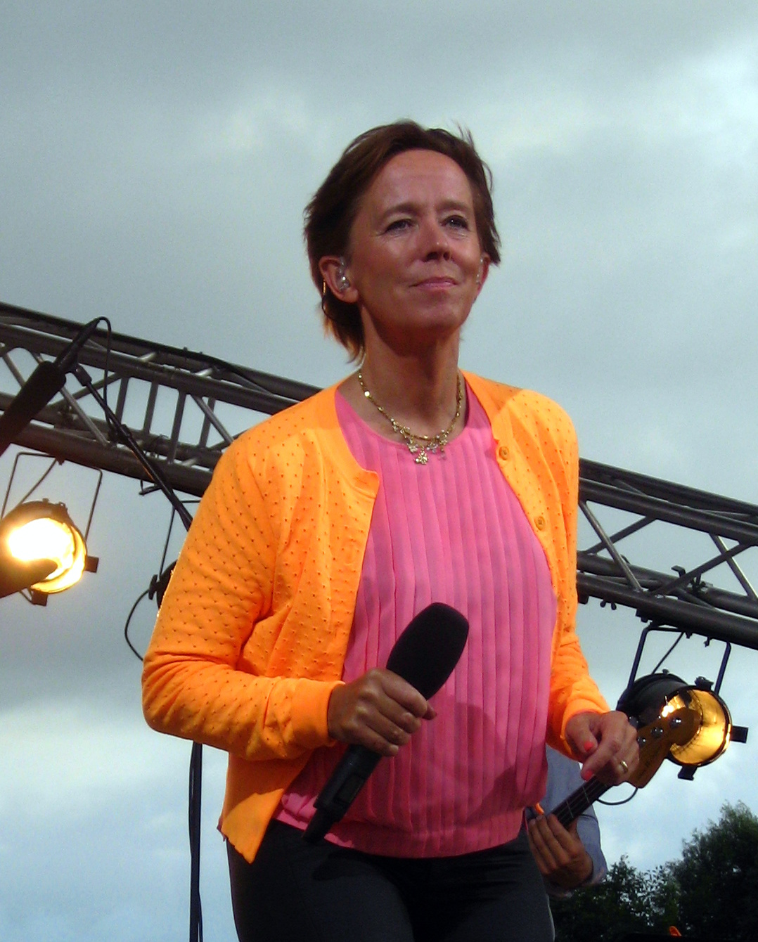 Anne Dorte Michelsen